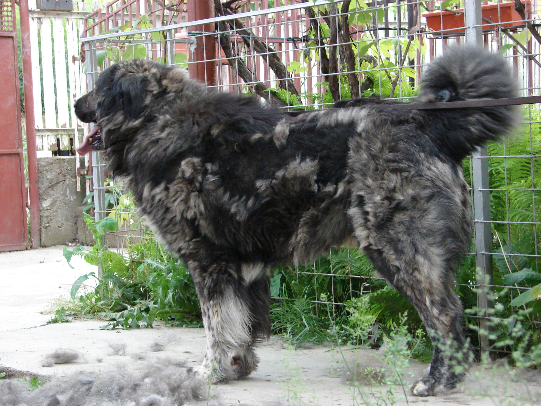 Ciobănesc caucazian în perioada de năpârlire